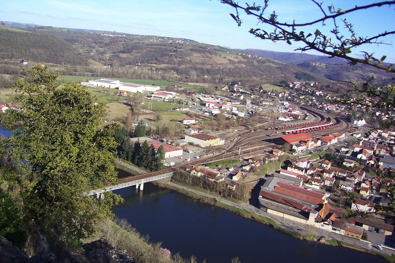 Vue de la gare de Capdenac-Gare depuis Capdenac-le-Haut